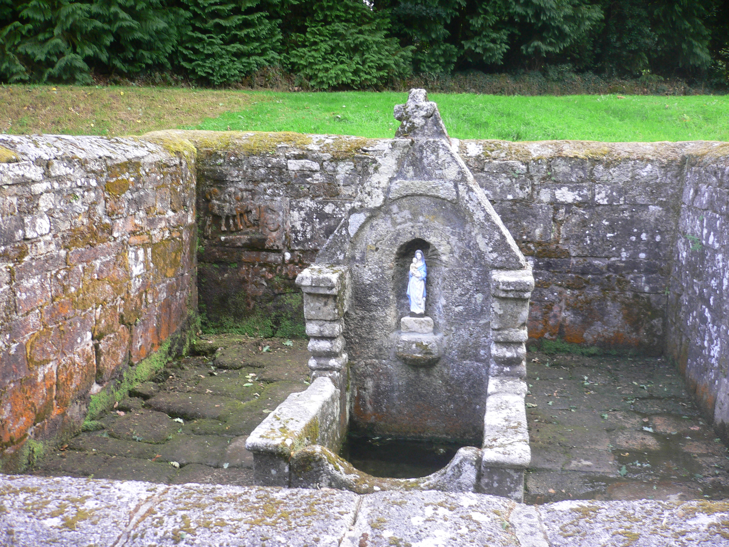 Fontaine de Notre-Dame-de-la-Clarté à Querrien (département du Finistère)